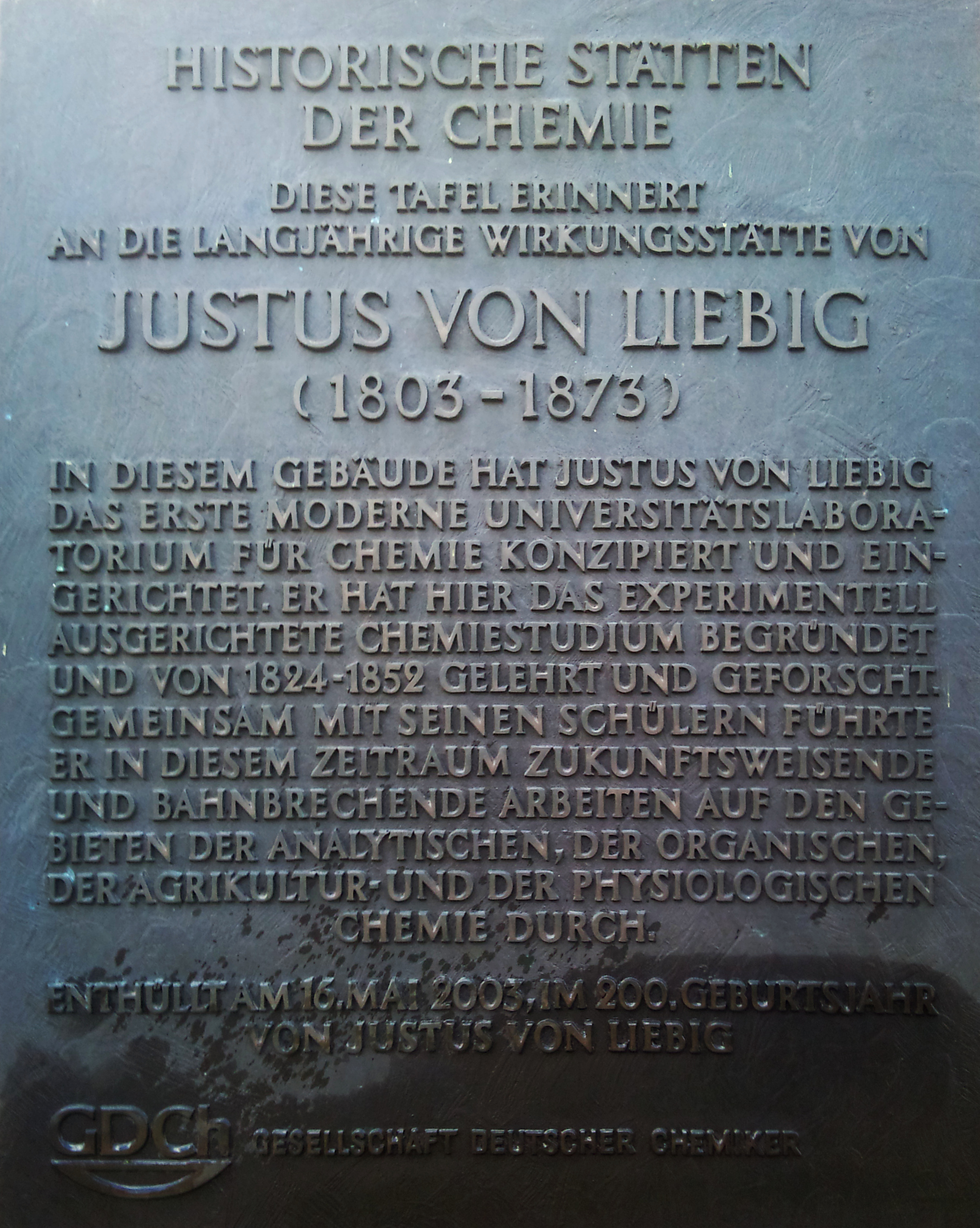 Das Liebig-Museum in Gießen, eine Historische Stätte der Chemie: Auszeichnung, verliehen im Mai 2003 anlässlich des 200. Geburtstages von Justus Liebig